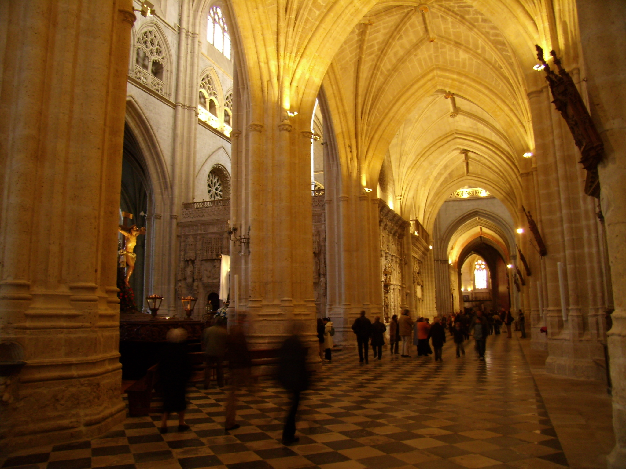 Vista de la nave de la Epístola de la Catedral de Palencia.